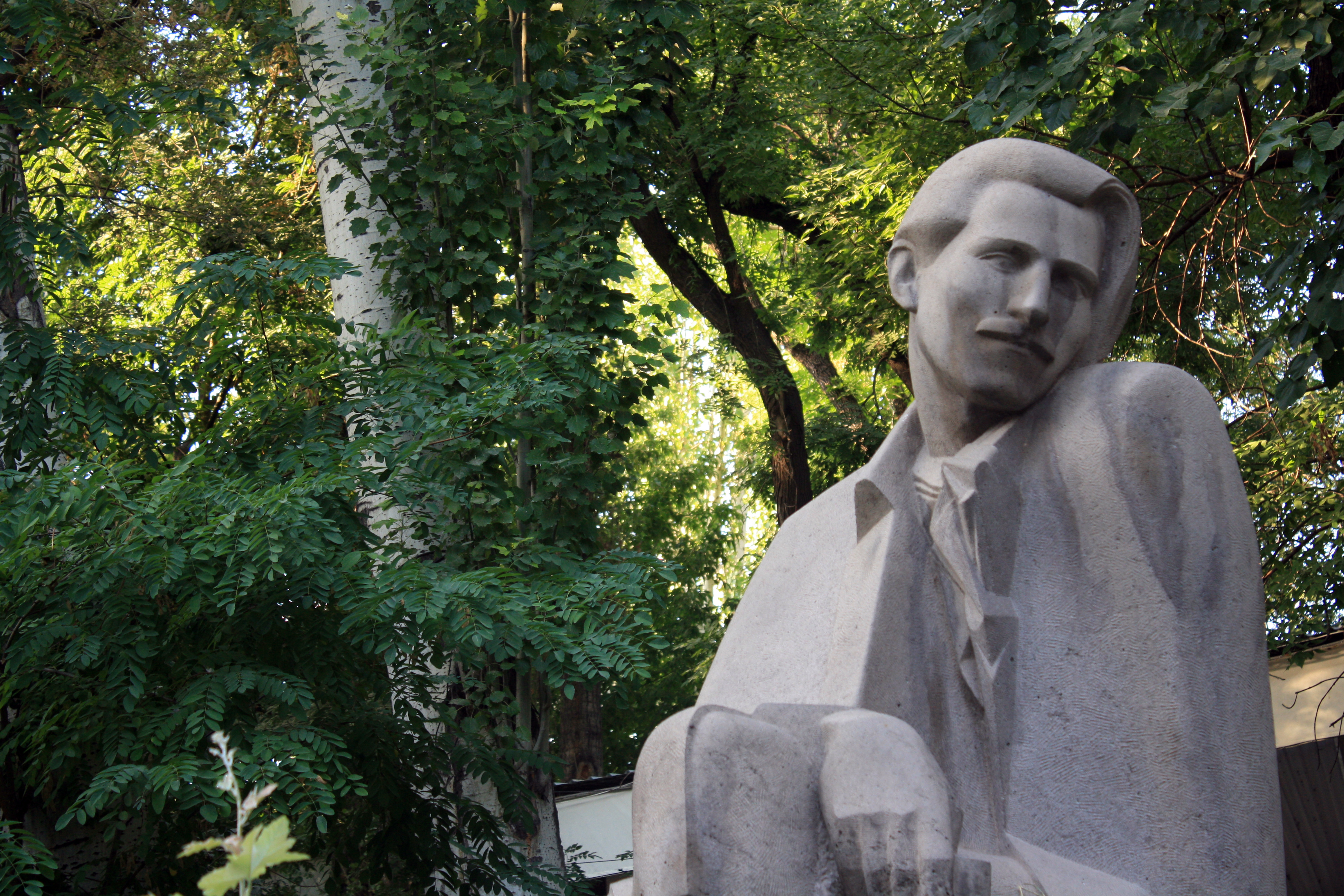 Հուշարձան` Վահան Տերյանի 6/144